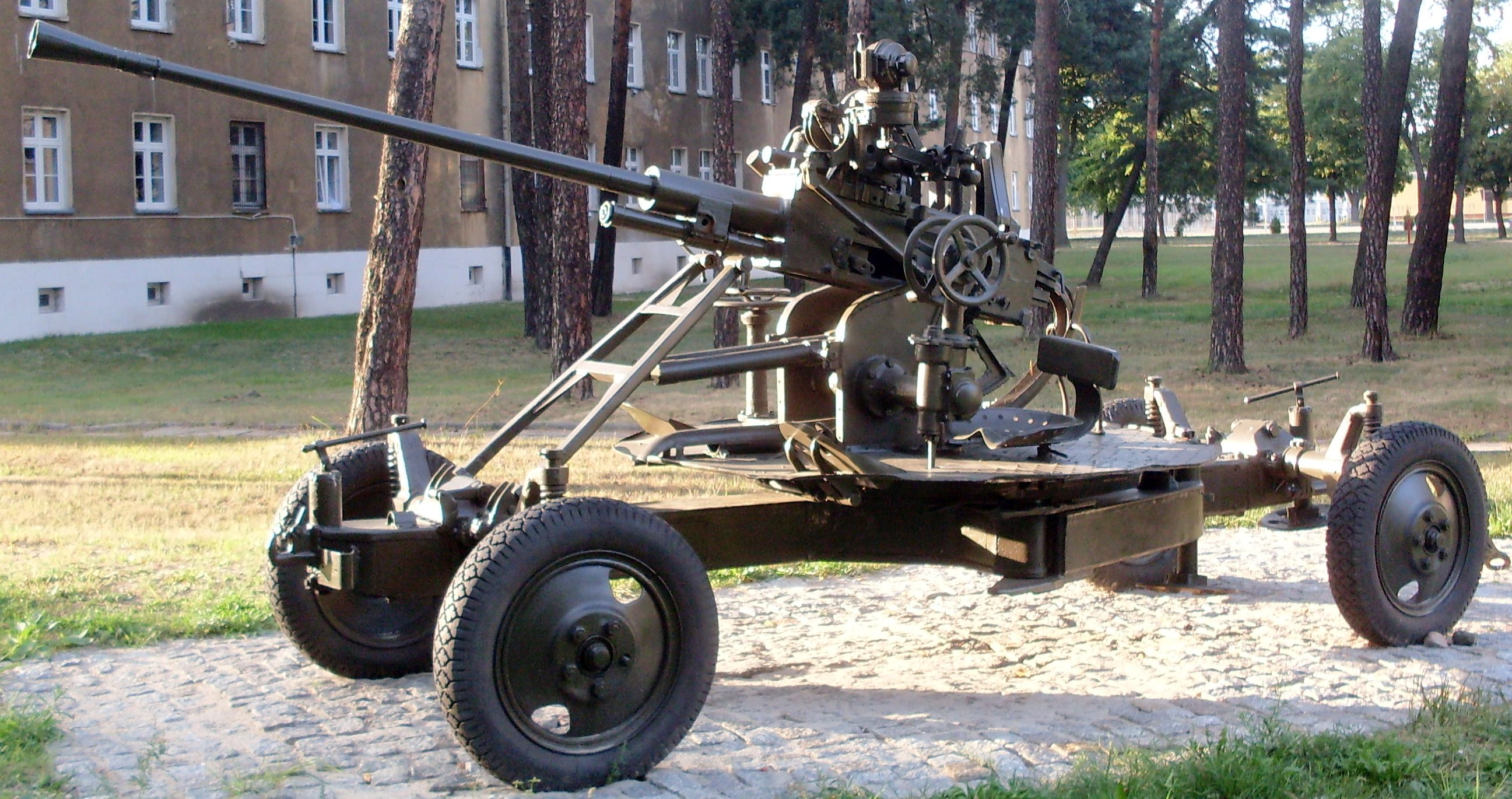 37_mm_armata_plot